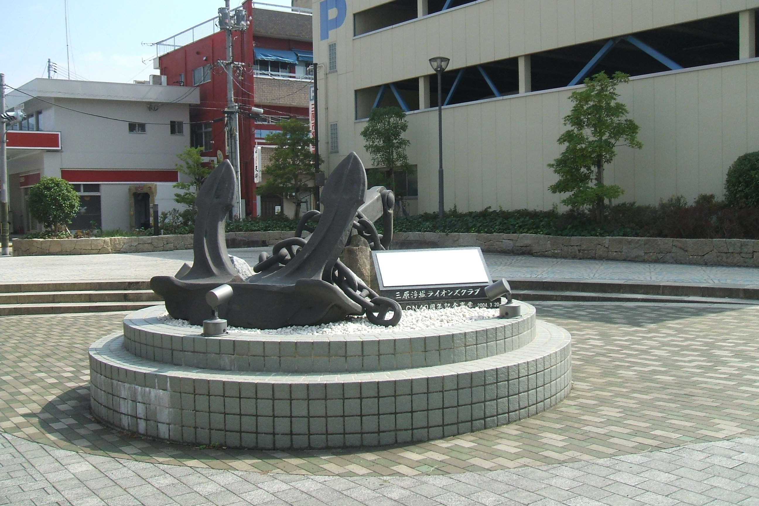 広島県三原市で保存されている興安丸の錨。